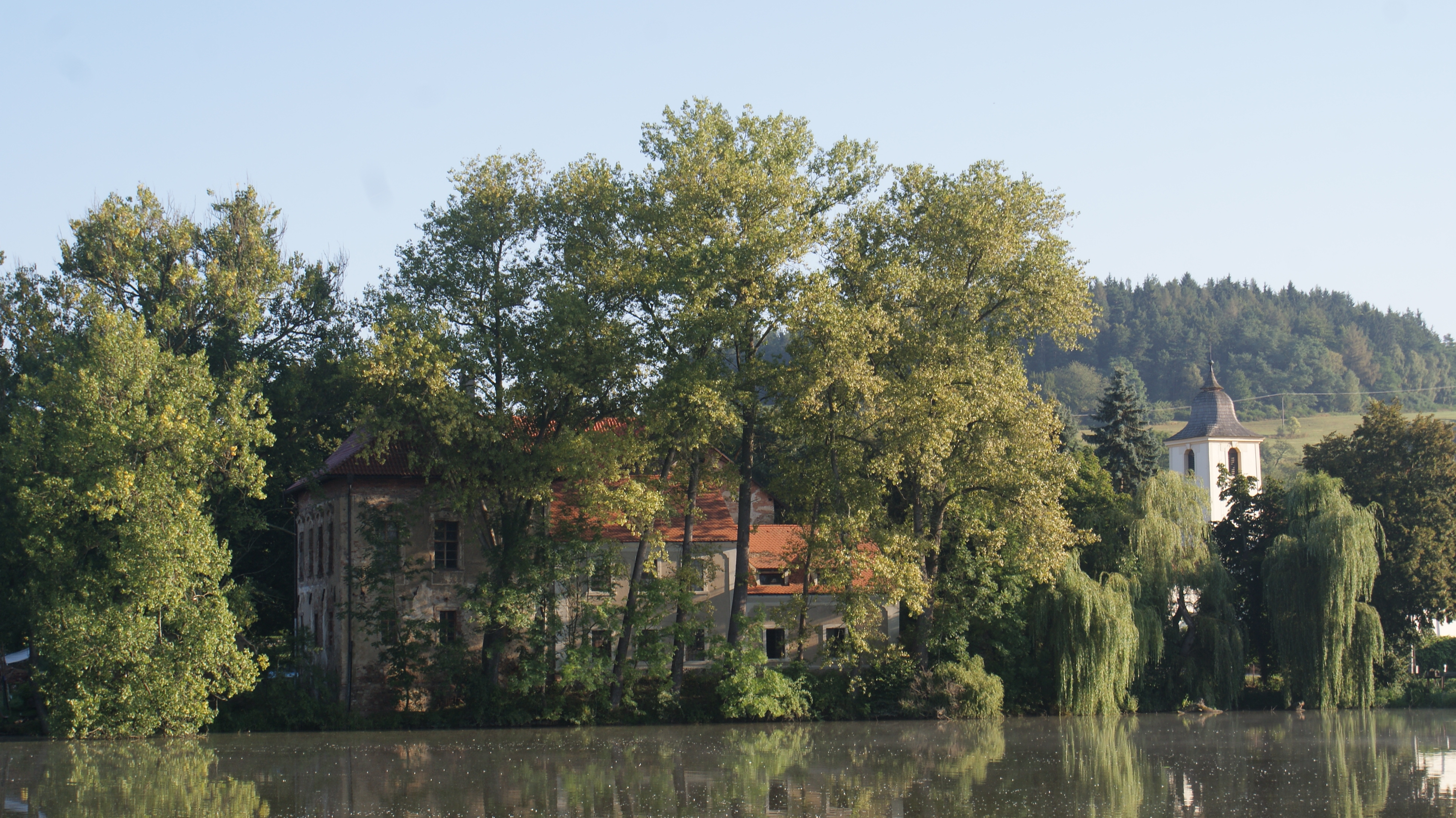 Vodní tvrz Popovice (okres Benešov) a kostel sv. Jakuba Většího. Pohled na sever z jižního břehu Popovického rybníka. Tvrz Popovice (Benešov) je vynikající ukázkou vývoje panského sídla od tvrze k renesančnímu a baroknímu zámečku. Část jejího obranného systému z jihu tvořil Popovický (nazývaný dříve Mlýnský, někdy též Zámecký rybník), jehož jižního břehu je snímek pořízen. Levá část budovy tvrze je její západní křídlo, Na západní křídlo z jihu navazují hospodářské budovy tvrze (se šedobílou fasádou). Nad nižší budovou vpravo je viditelný cihlový štít novodobé nástavby gotické věže. Vpravo je vidět konec hráze rybníka, přes kterou vede po mostě silnice a kostel sv. Jakuba Většího. Ve vegetačním období je tvrz z jihu téměř zakryta stromy